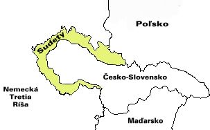 Kategória:Obrázky máp Kategória:Slovenský popis v obrázku Kategória:Presunúť na Commons